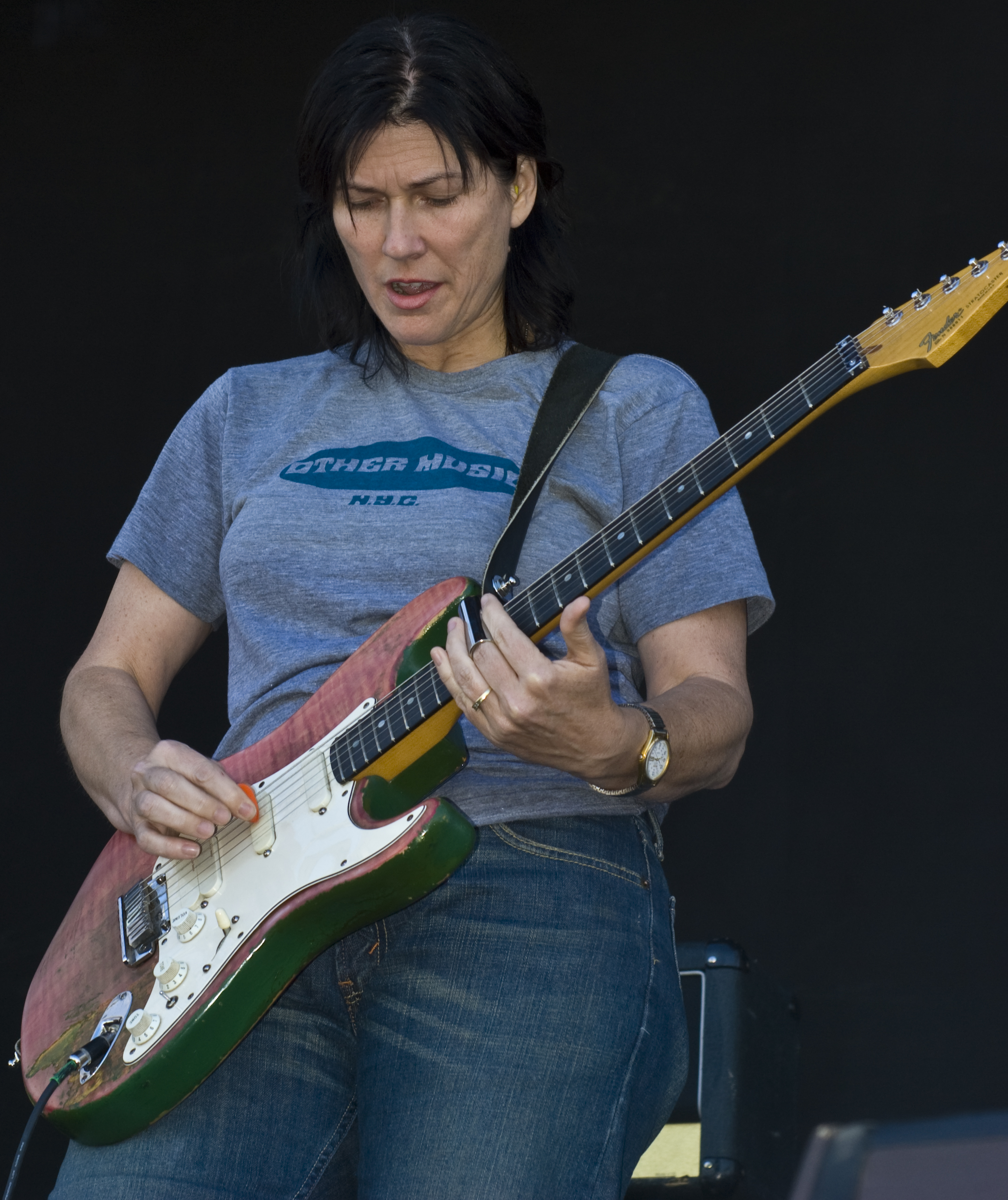 Kelley Deal en el Summercase 2008 Resulta claramente perceptible el paso del tiempo sobre esta mujer....